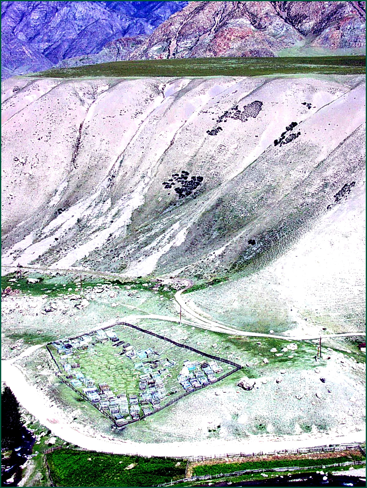 Мощная, свыше 240 м, толща дилювия с возрастом поверхности около 15 тыс. лет, сброшенная дилювиальным потоком в устьевой части долины р. Ини, правый приток Катуни, Алтае. Толща бронировала первоначально до последующего размыва долину притока, и выше по долине р. Ини формировались дилювиально-подпрудные озера.